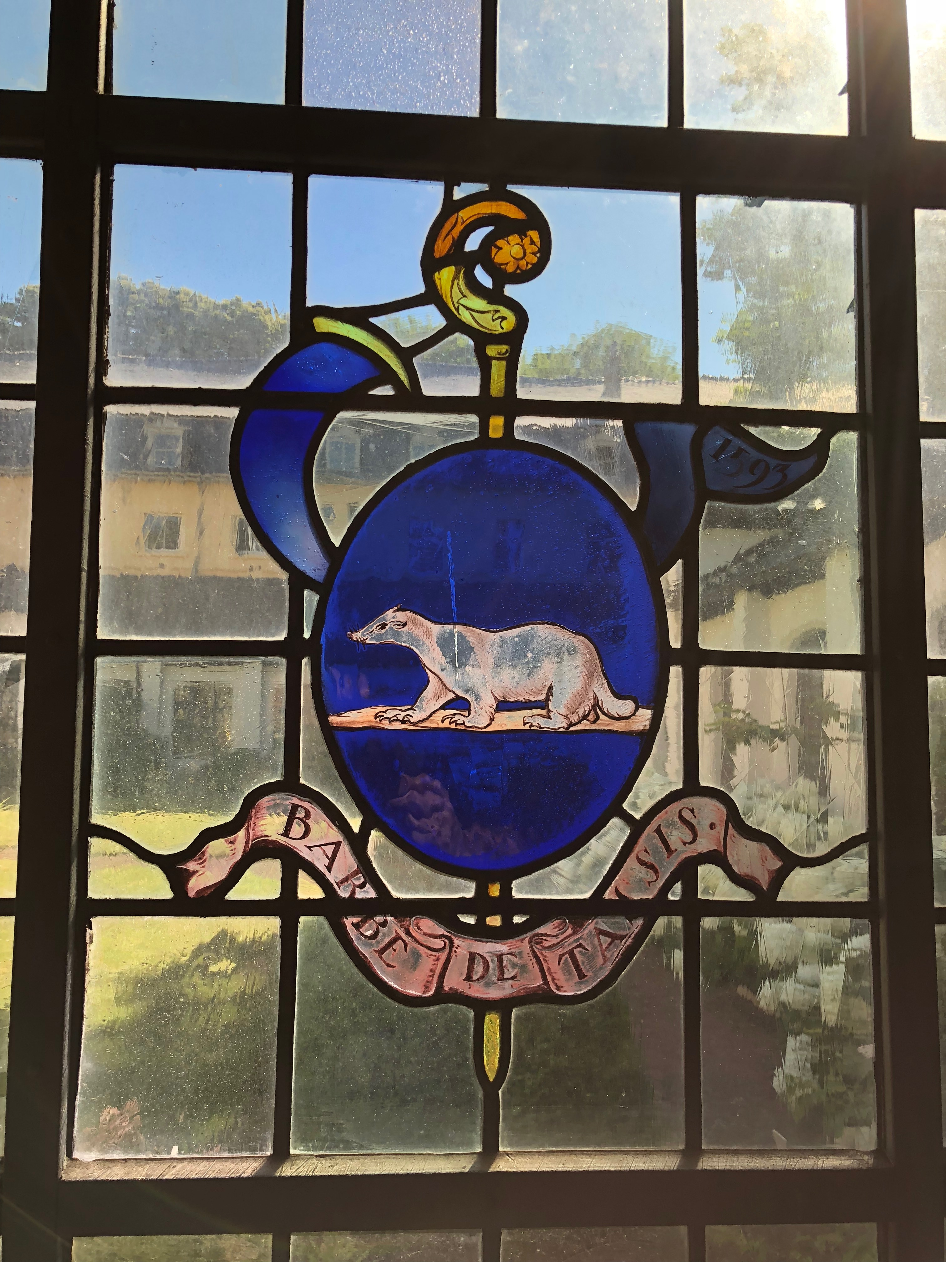 Barbe de Tassis